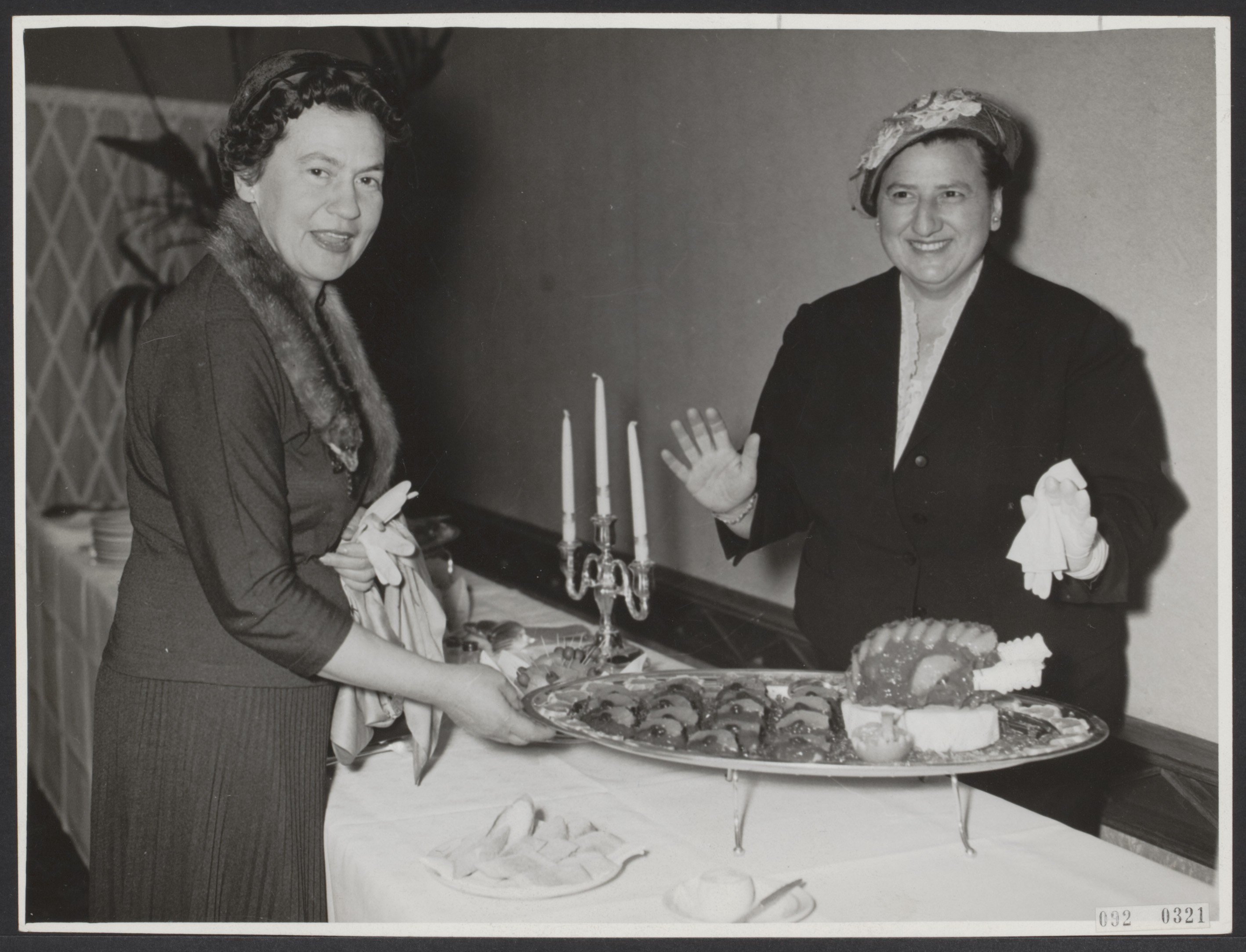 Collectie / Archief : Fotocollectie Elsevier Reportage / Serie : [ onbekend ] Beschrijving : Mevrouw R. Cidor, echtgenote van de Israëlitische ambassadeur en Molly Lyons Bar-David (rechts) Annotatie : Molly Lyons Bar-David, echtgenote van de oorspronkelijk Nederlandse Jaap David (Bar-David), journaliste en kookboekenschrijfster, kwam naar Nederland als ambassadrice van citrusfruit. [Naam Mosje Knol op achterzijde is fout, red.] Datum : 18 maart 1958 Trefwoorden : diners Persoonsnaam : Cidor, R., Lyons Bar-David, Molly Fotograaf : Bilsen, Joop van / Anefo Auteursrechthebbende : Nationaal Archief Materiaalsoort : Foto (zwart/wit) Nummer archiefinventaris : bekijk toegang 2.24.05.02 Bestanddeelnummer : 092-0321